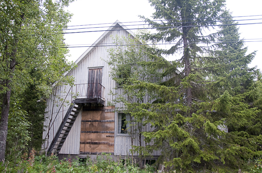 Ett förfallet Folkets Hus i Kroksjö strax innan rivning. Foto: Bertil Leidner